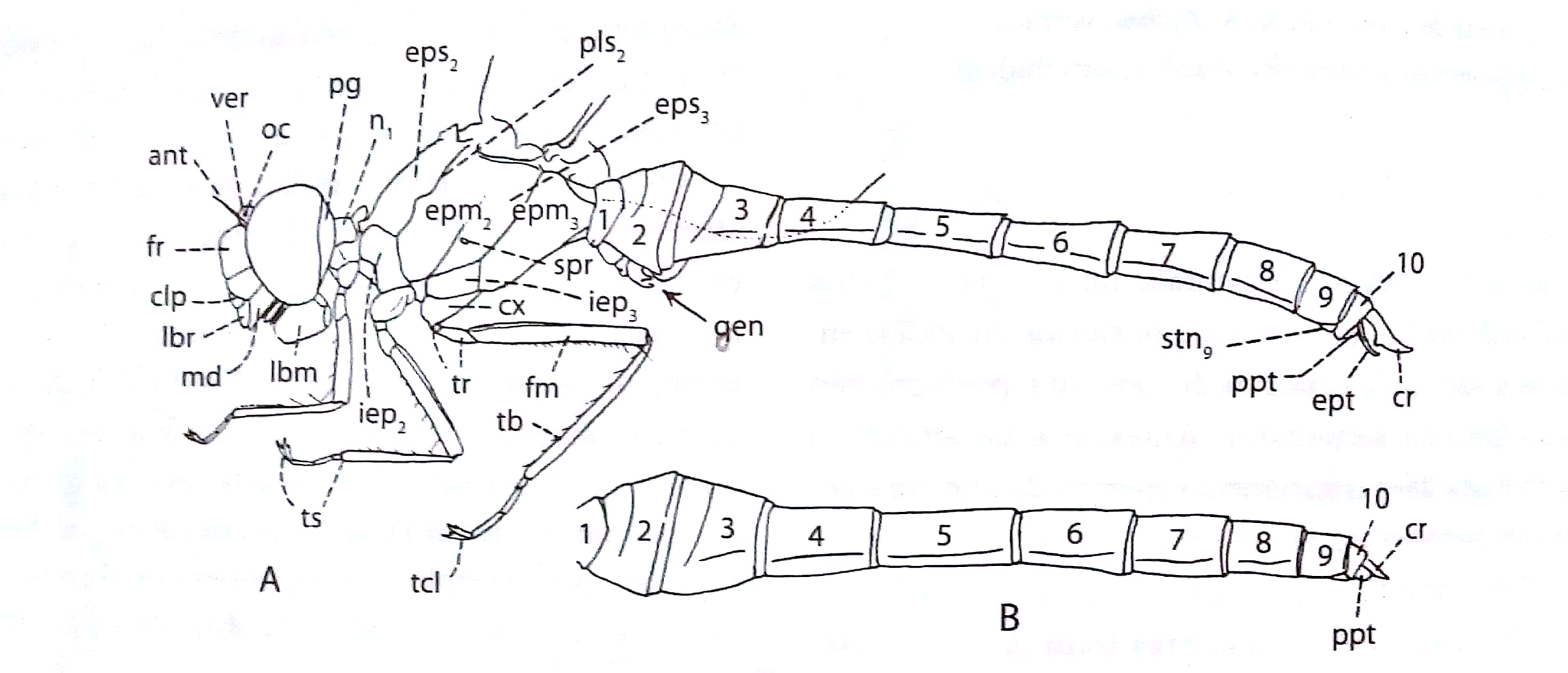 Características estruturais de Odonata. A, vista lateral de um macho de Sympetrum internum; B, vista lateral do abdômen de uma fêmea da mesma espécie.